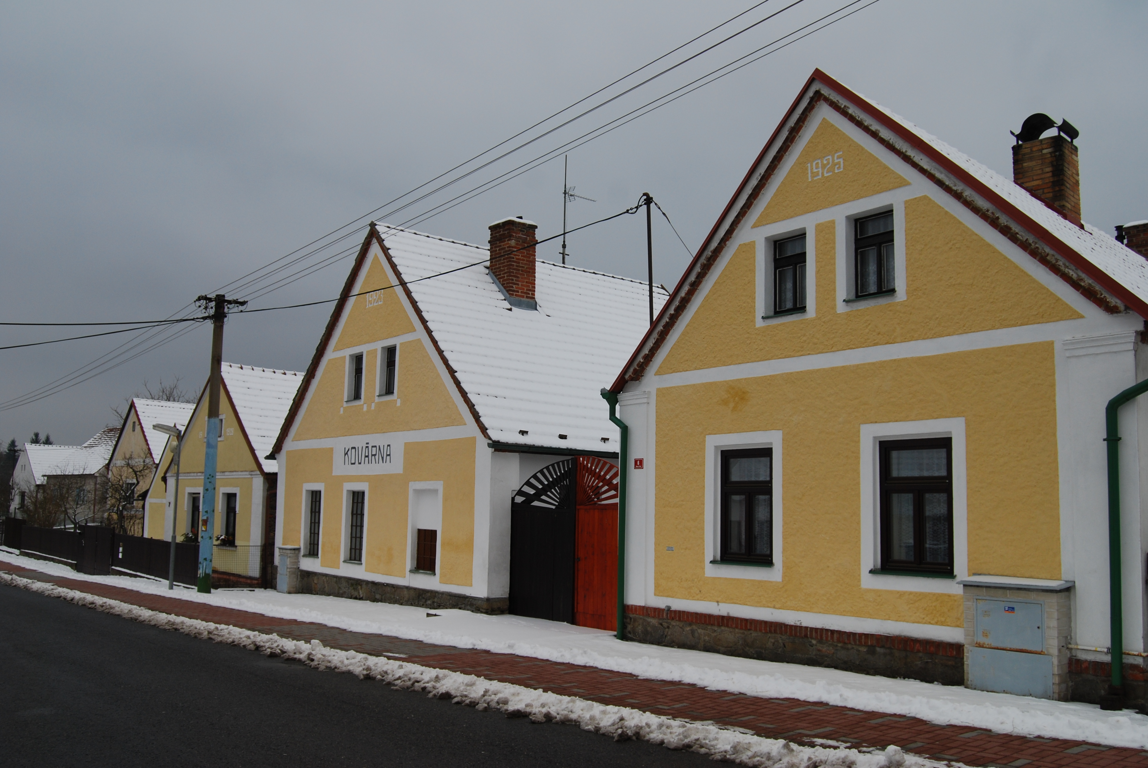 Stavení ve vesnici. Nová Vráž je vesnice, část obce Vráž v okrese Písek. Okres Písek. Česká republika.